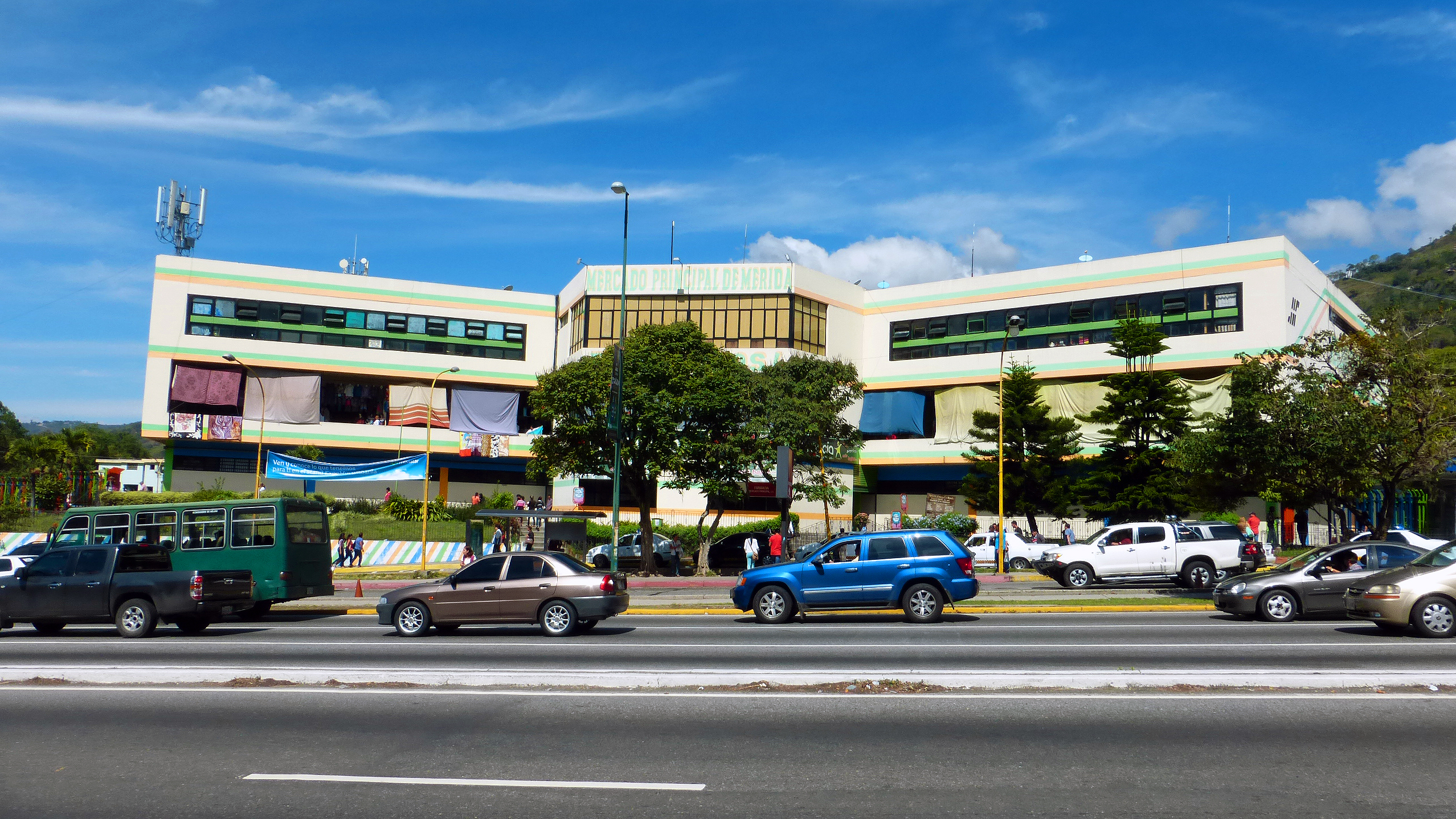 Fachada del Mercado Principal de Merida